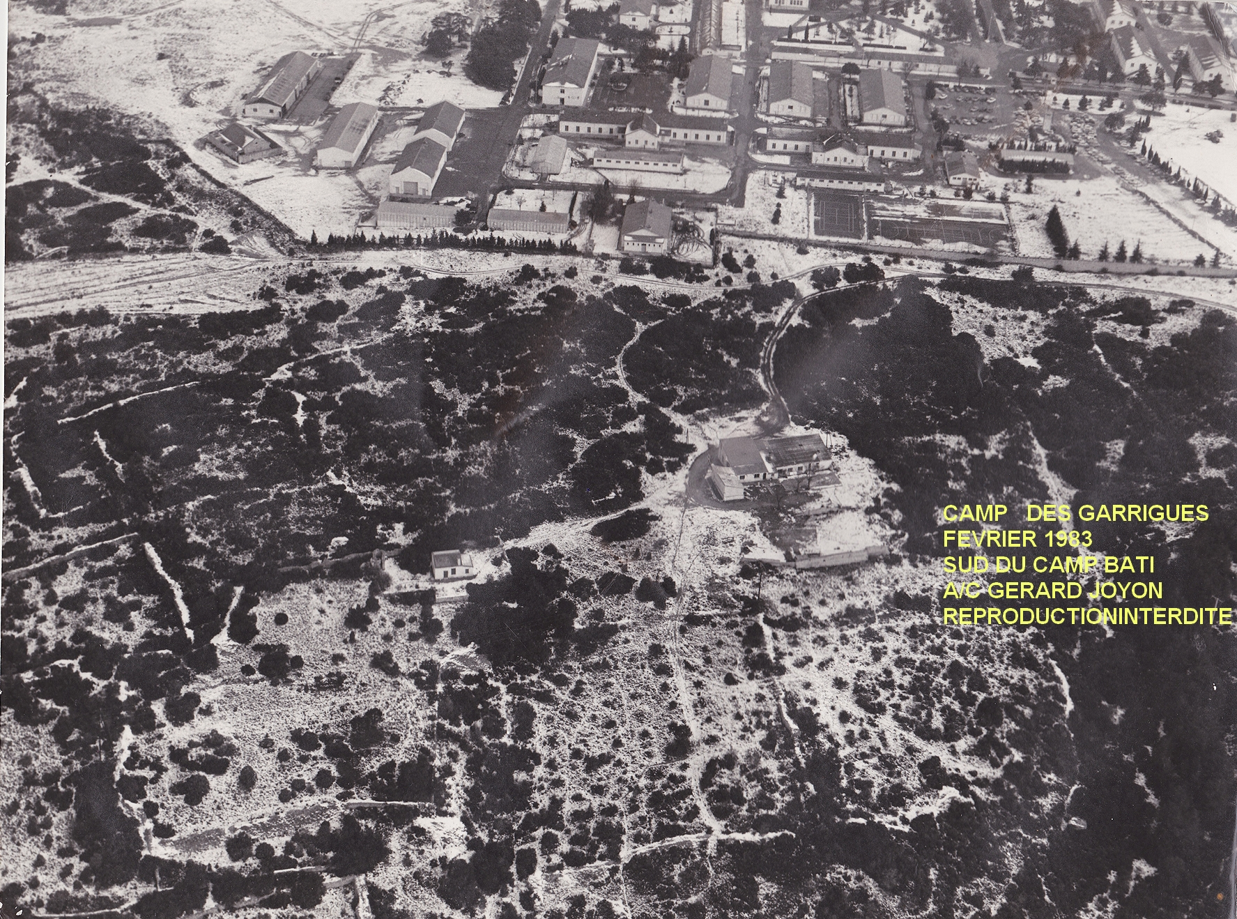 Photo prise lors de ma mission de surveillance en hélicoptère. 15 février 1983 Surveillance consistant à vérifier intégrité et pénétration sur ce terrain militaire. La neige permet de déceler toute trace de passage dans les limites